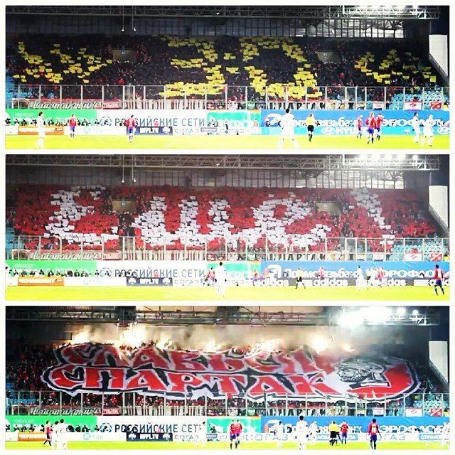 Перфоманс с переворачиванием модулей на гостевом матче с ЦСКА. Сезон 2013/14 годов.